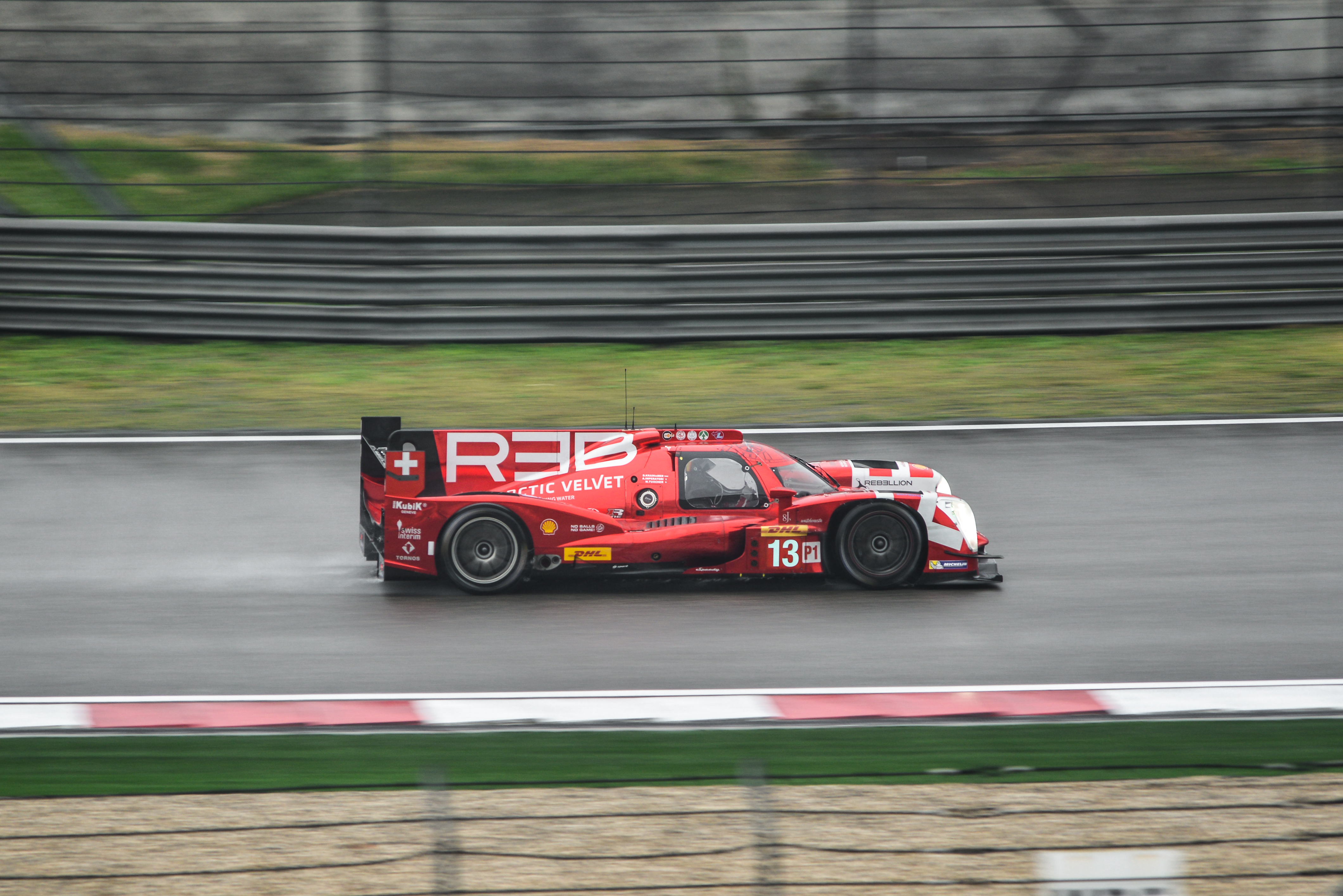 WEC, Shanghai, 2015